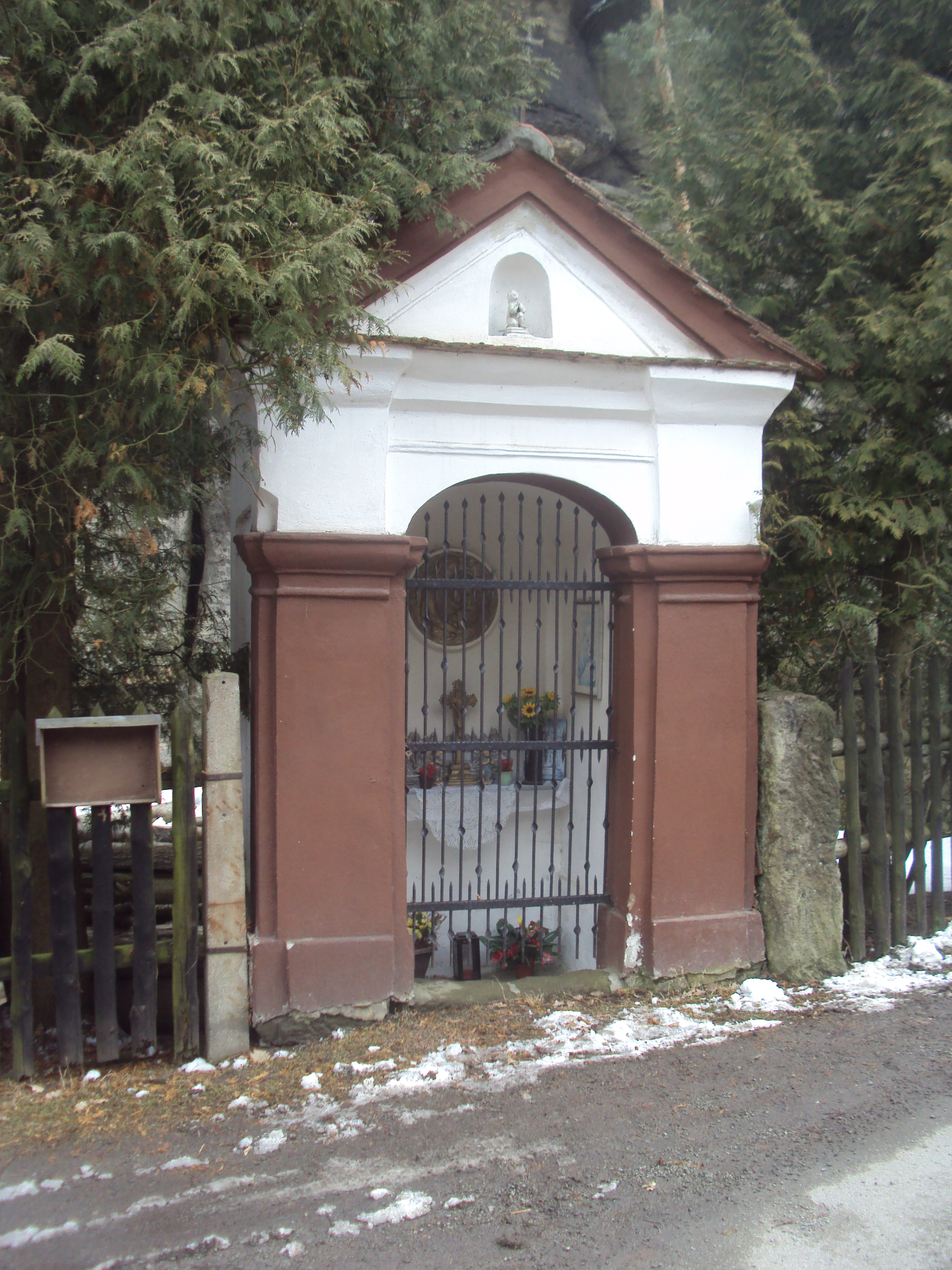 Česky: Kaple v osadě Karba